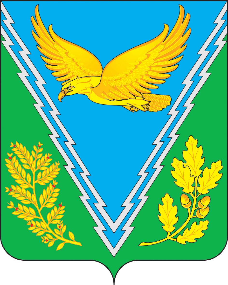 Герб Апшеронска